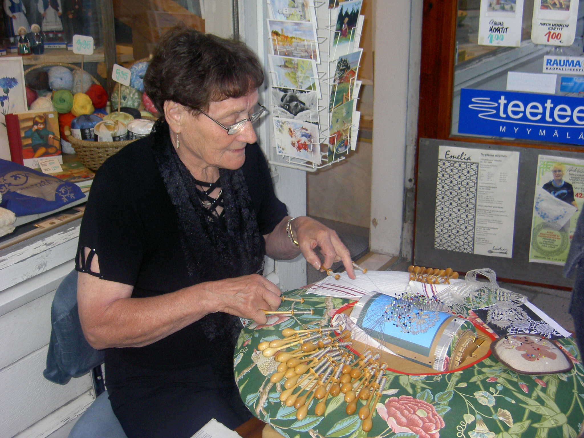 Spitzenklöpplerin in Rauma, Finnland